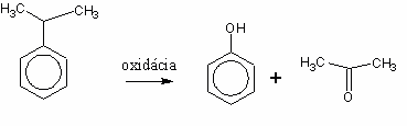 Fenoly